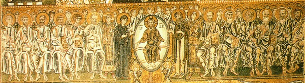 Torcello - registre 3